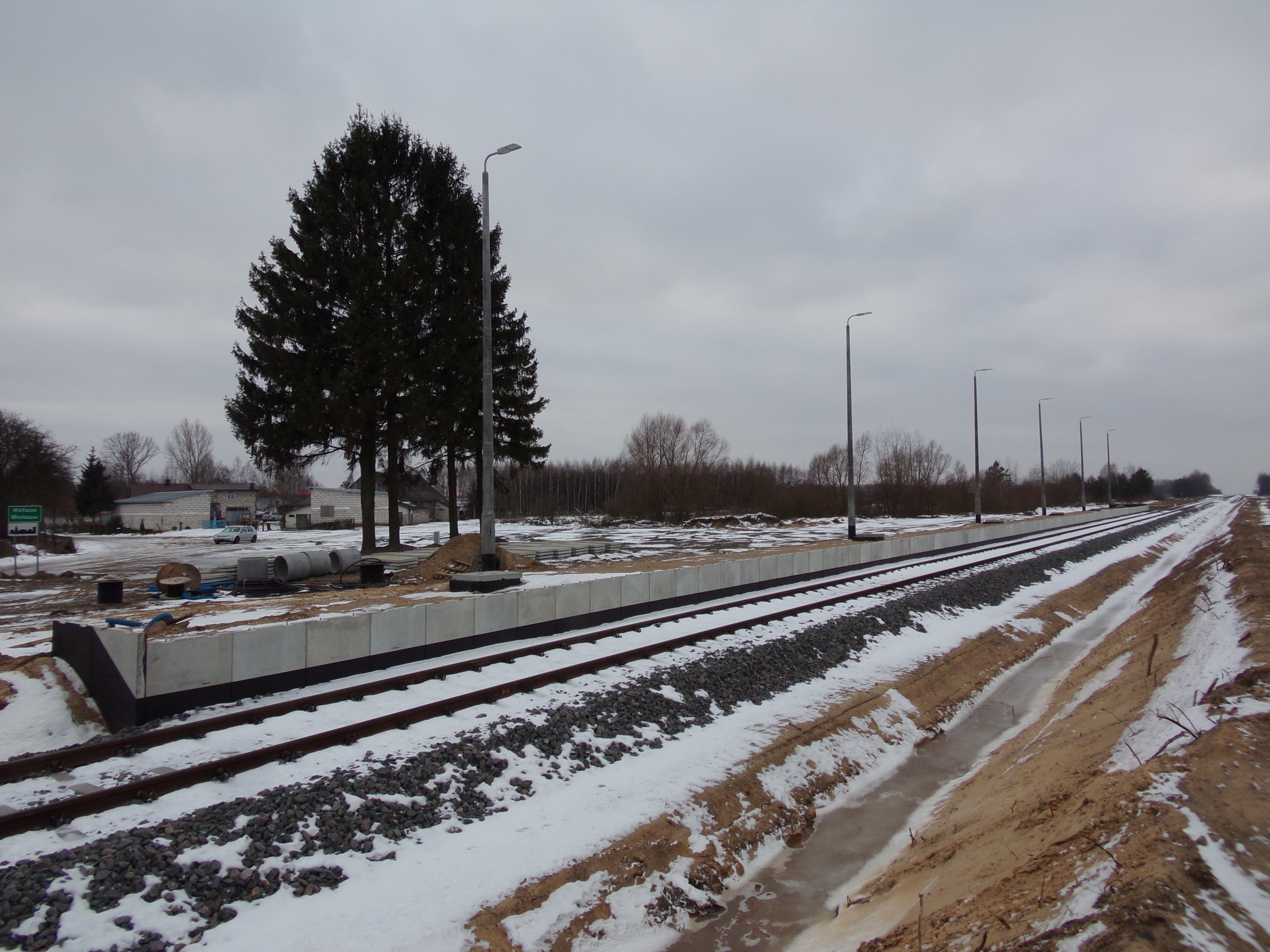 Widok na budowany peron przystanku osobowego Mikłasze.